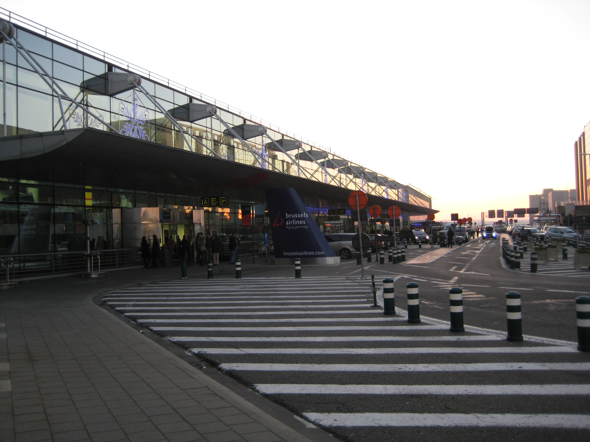 Zaventem